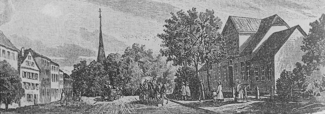 Wandsbeker Marktstraße im damals holsteinischen Flecken Wandsbek um 1800.